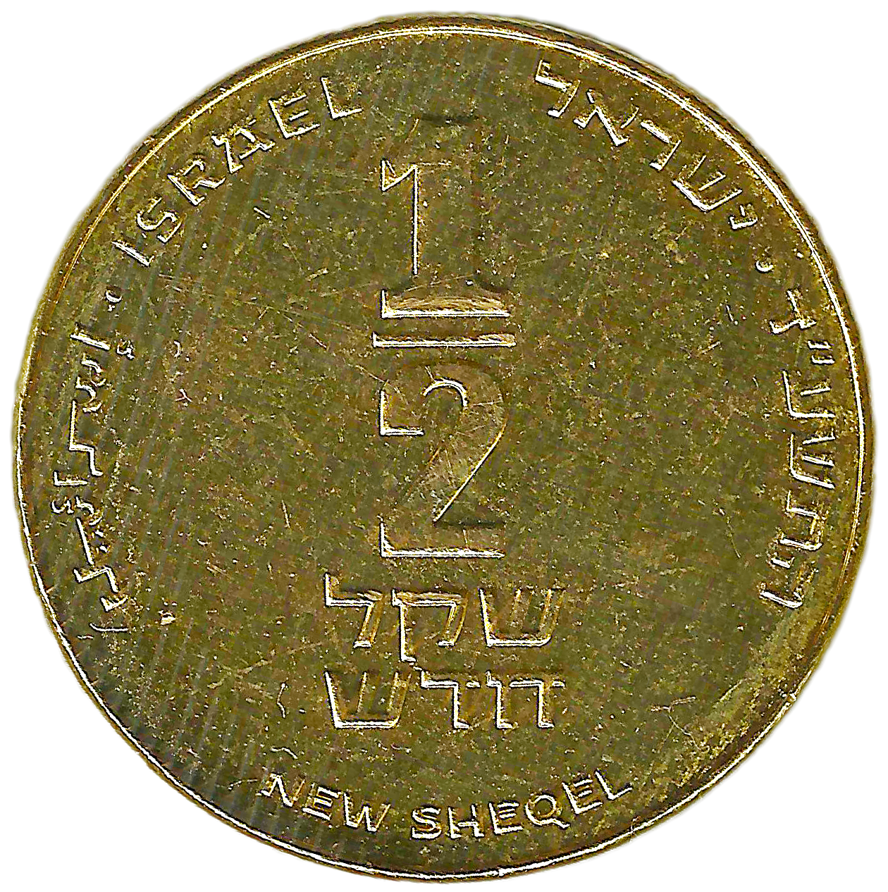 نصف شيكل إسرائيلي